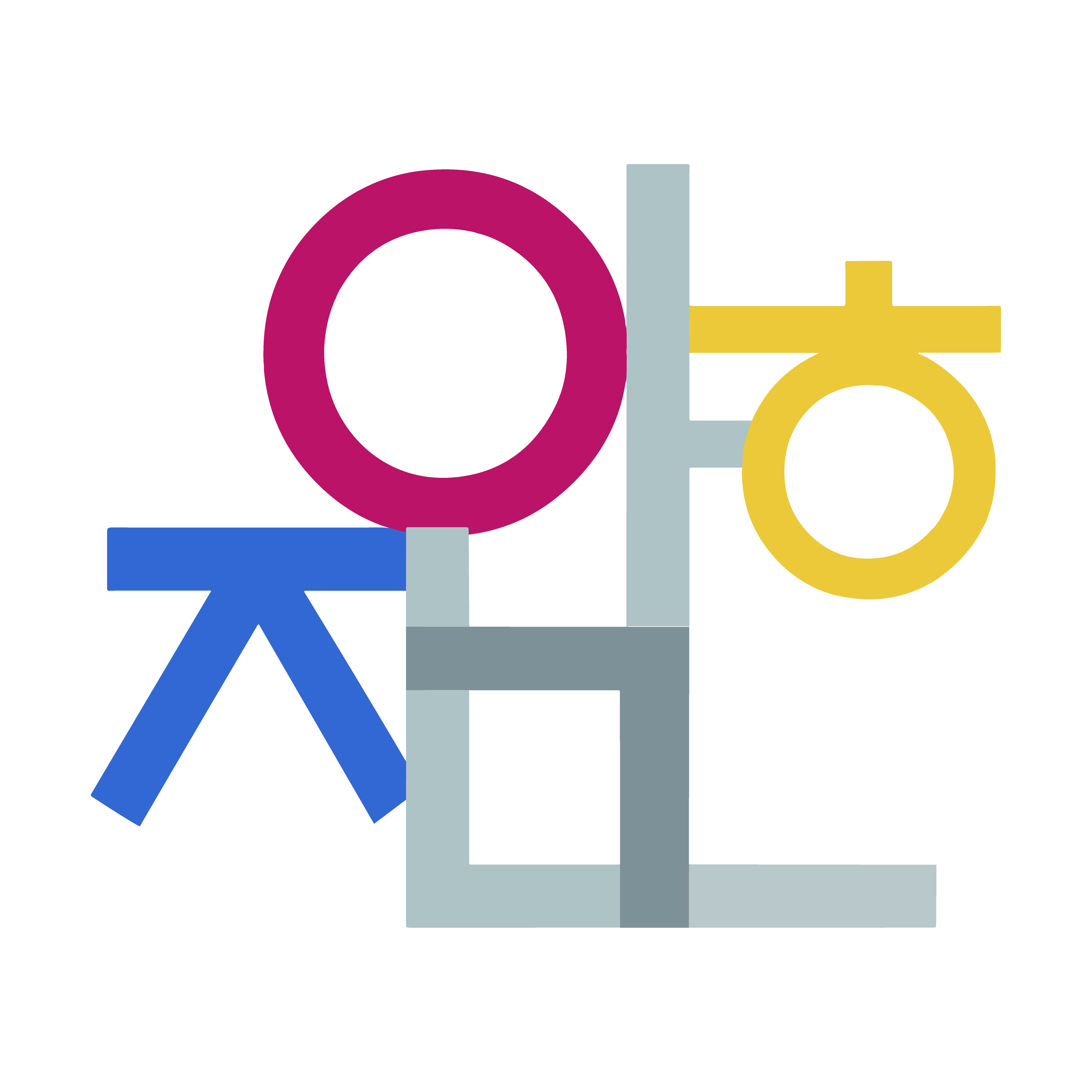 전약협 공식 마크